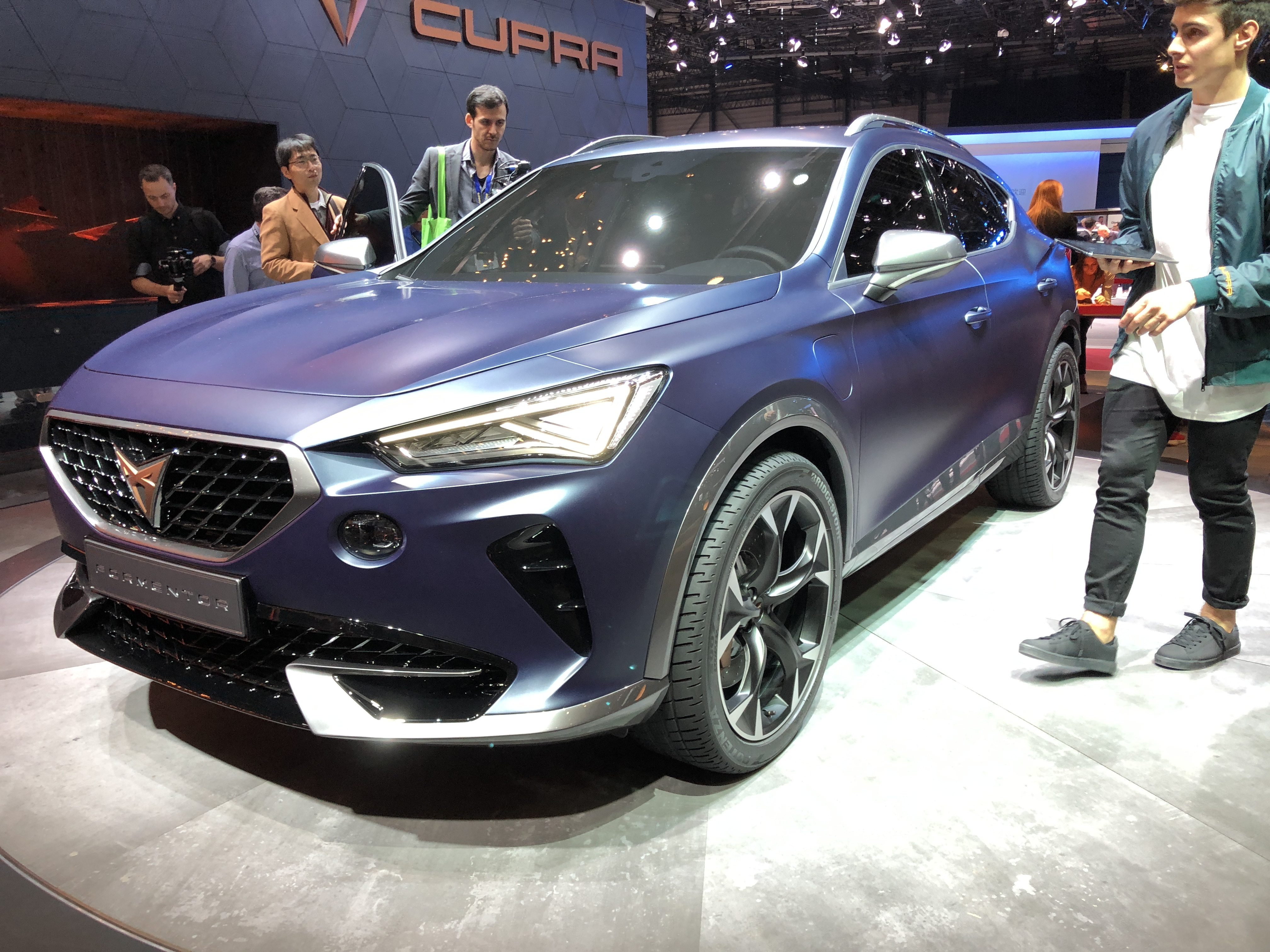 Vista delantera del Cupra Formentor.